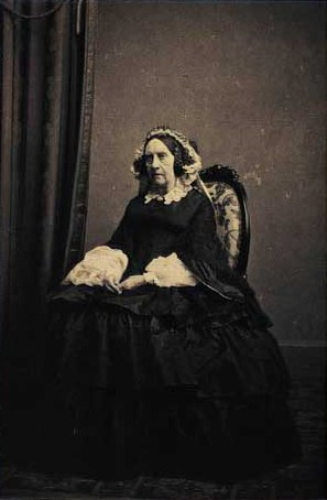 Frederikke Benedicte (Bente) Dannemand, født Rafsted, (06.08.1790–23.12.1862), kongens maîtresse. Det Kongelige Bibliotek